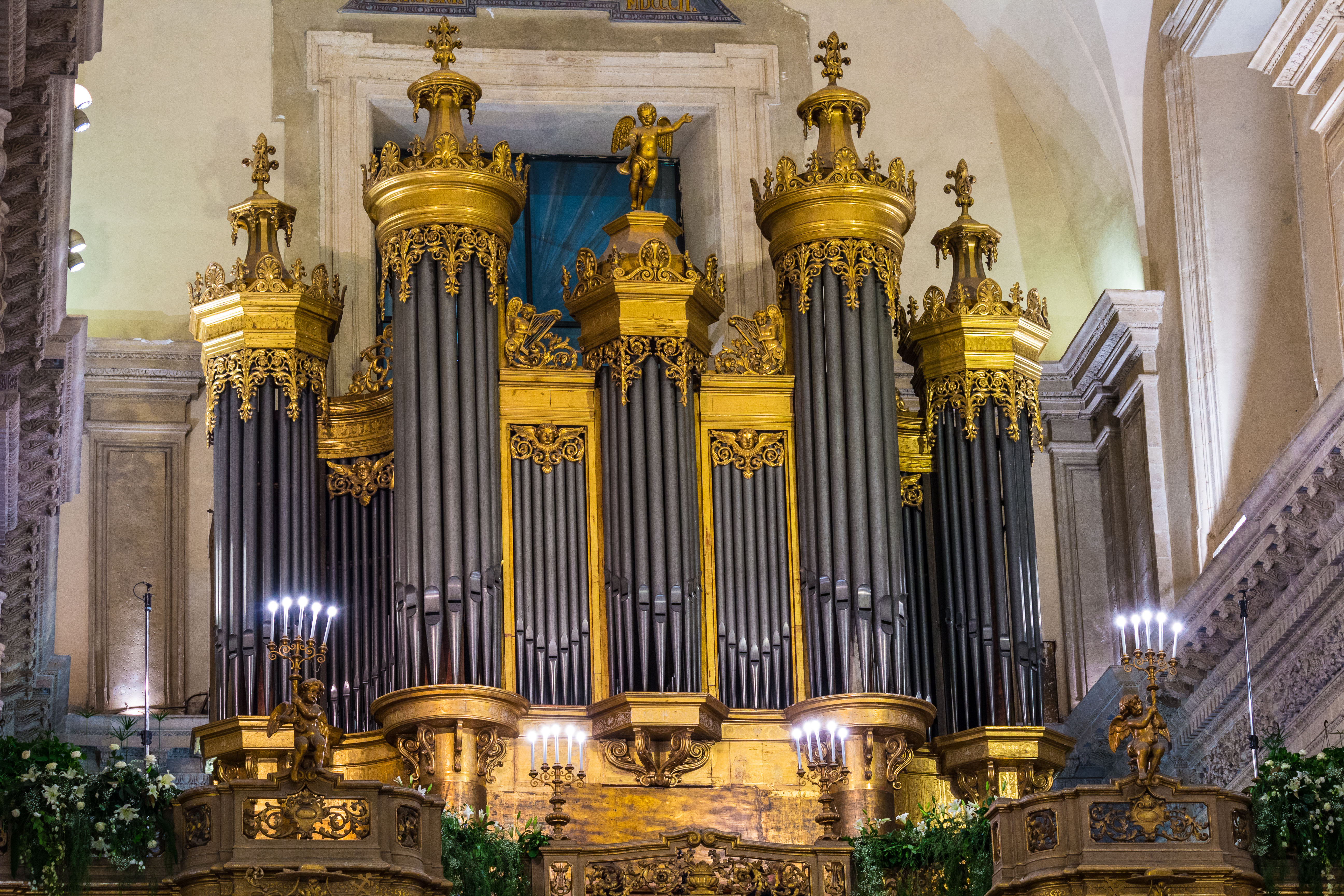 Domenico Chiarenza, opera propria, L'organo della Basilica di Sant'Agata (CT) dopo il restauro il giorno dell'inaugurazione 12/12/14, Pubblico Dominio.